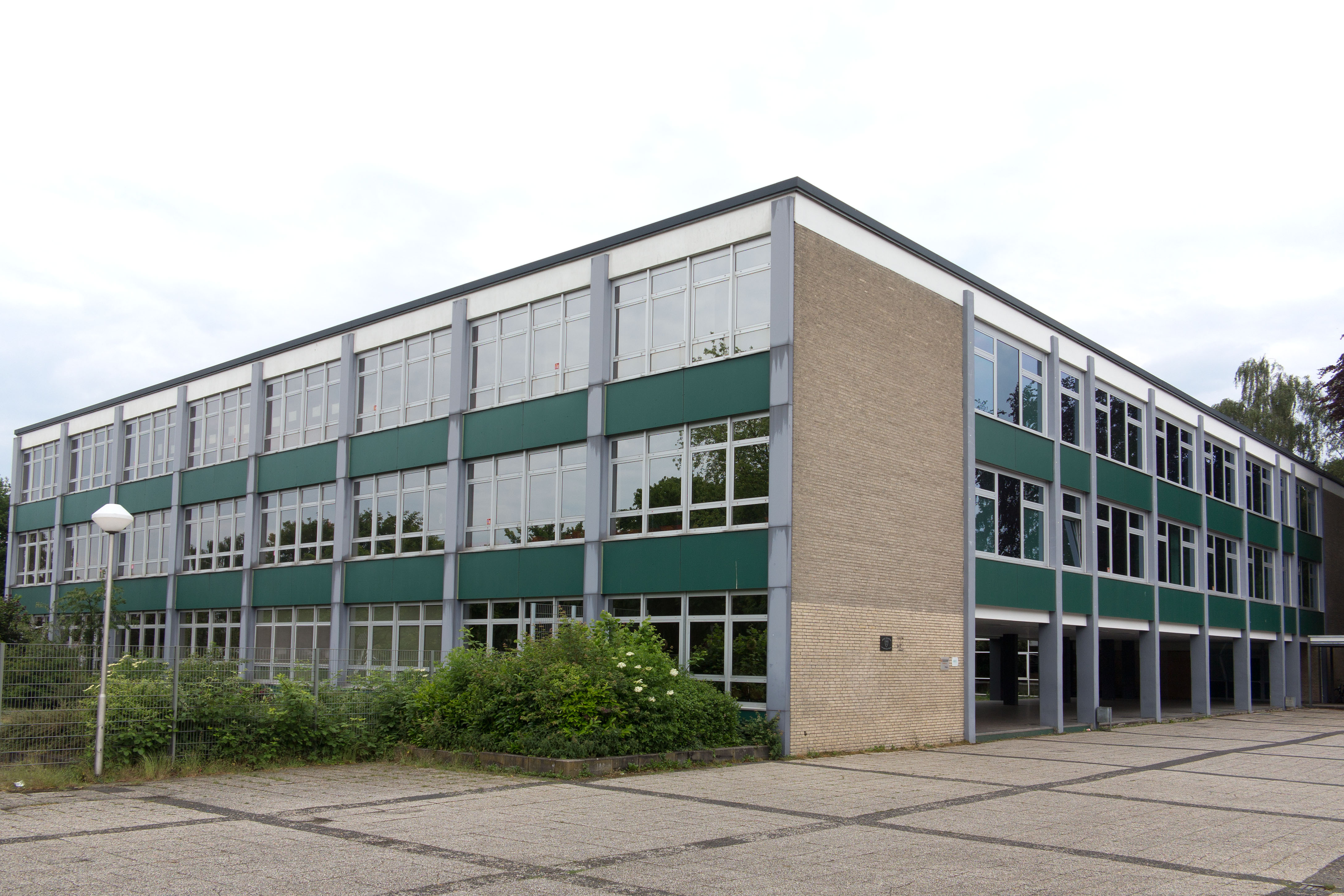 Luise-von-Duesberg-Gymnasium Berliner Allee 42, 47906 Kempen